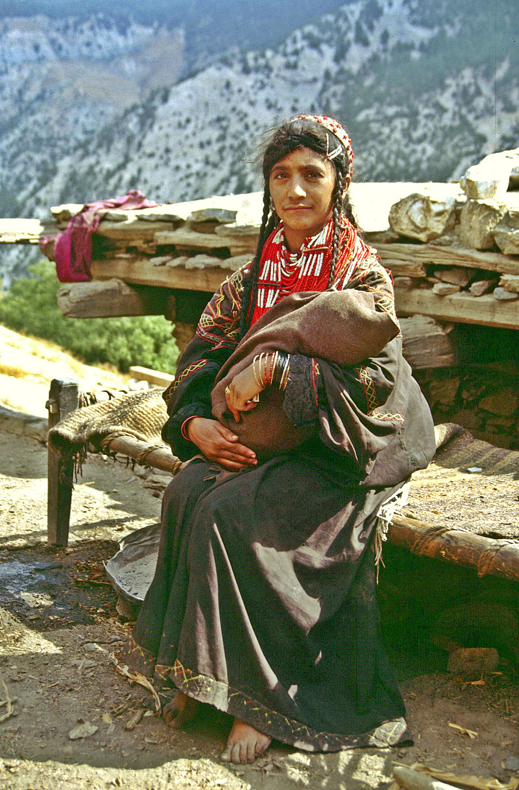 Kalash-Frau im Hindukusch